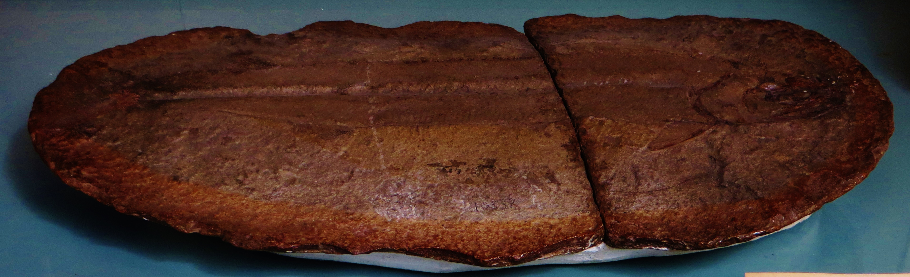 Fossil of Euthynotus, an extinct fish- Took the photo at Musee d'Histoire Naturelle, Paris